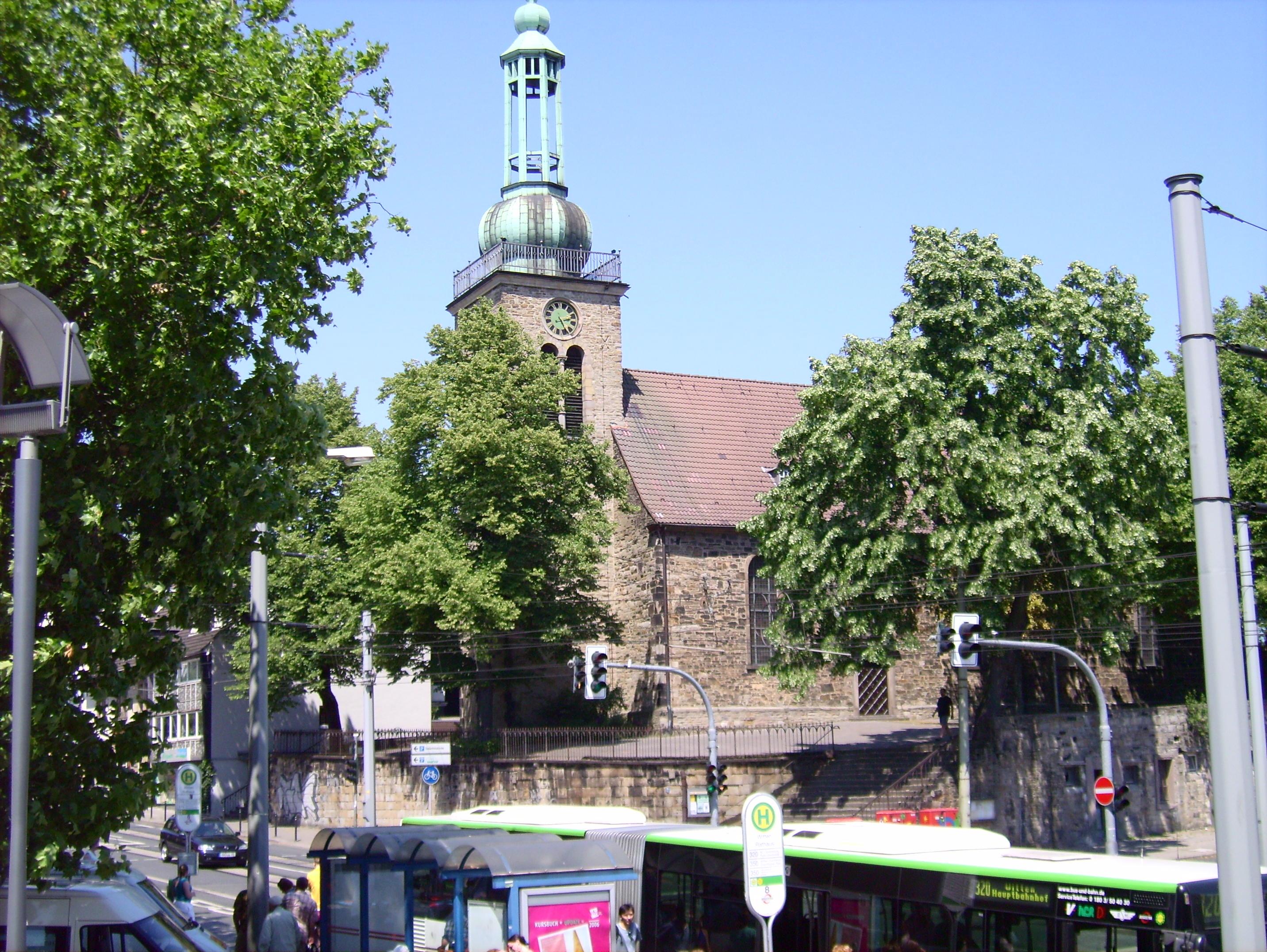 Johanniskirche, Witten This is a photograph of an architectural monument.